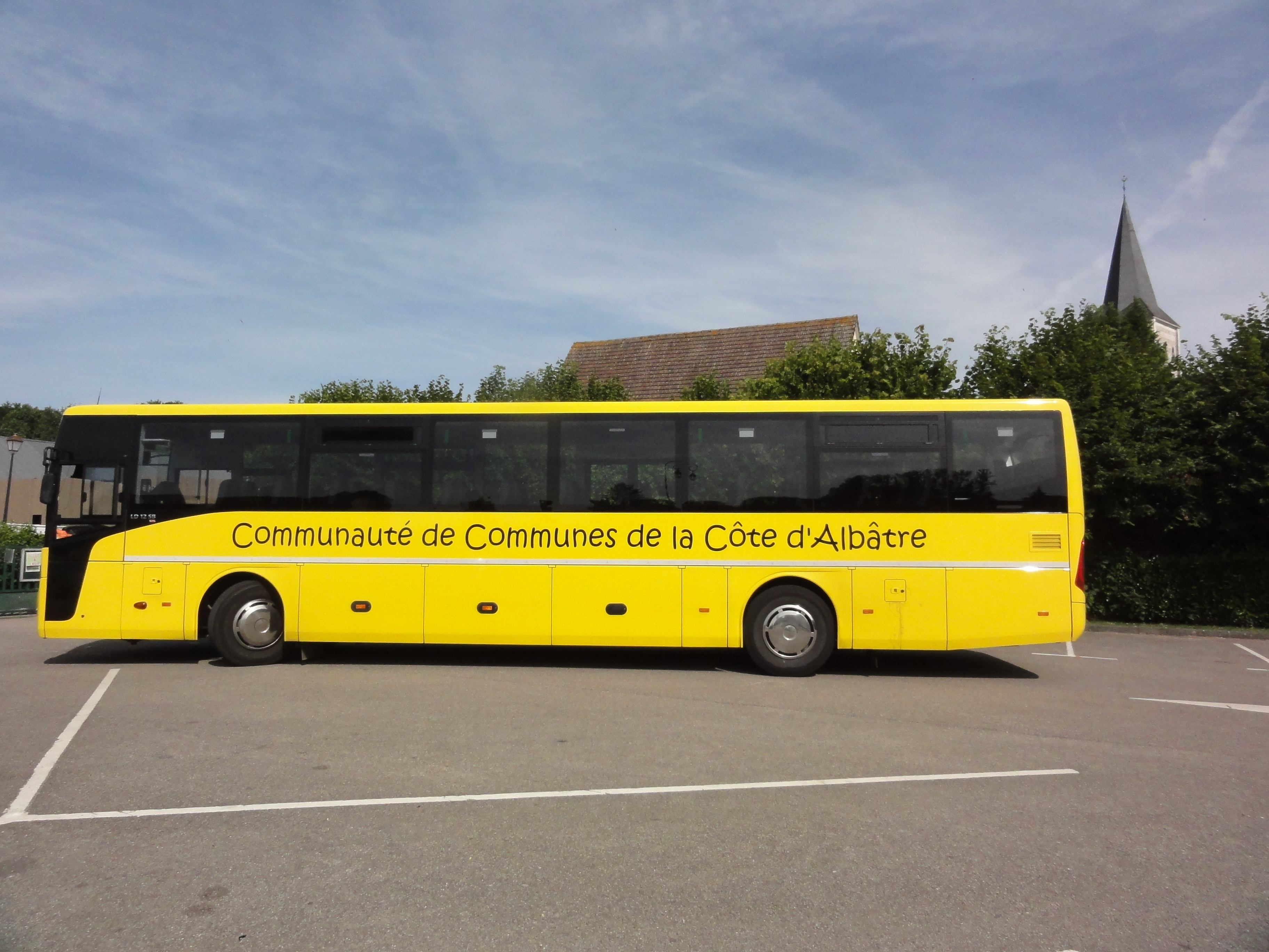 Ourville-en-Caux (Seine-Mar.) car scolaire CdC de la Côte d'Albâtre